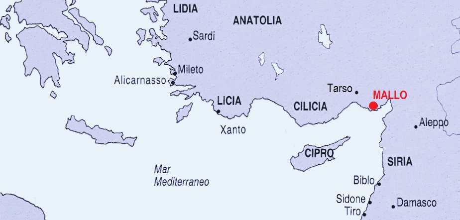 Mallo sul Piramo